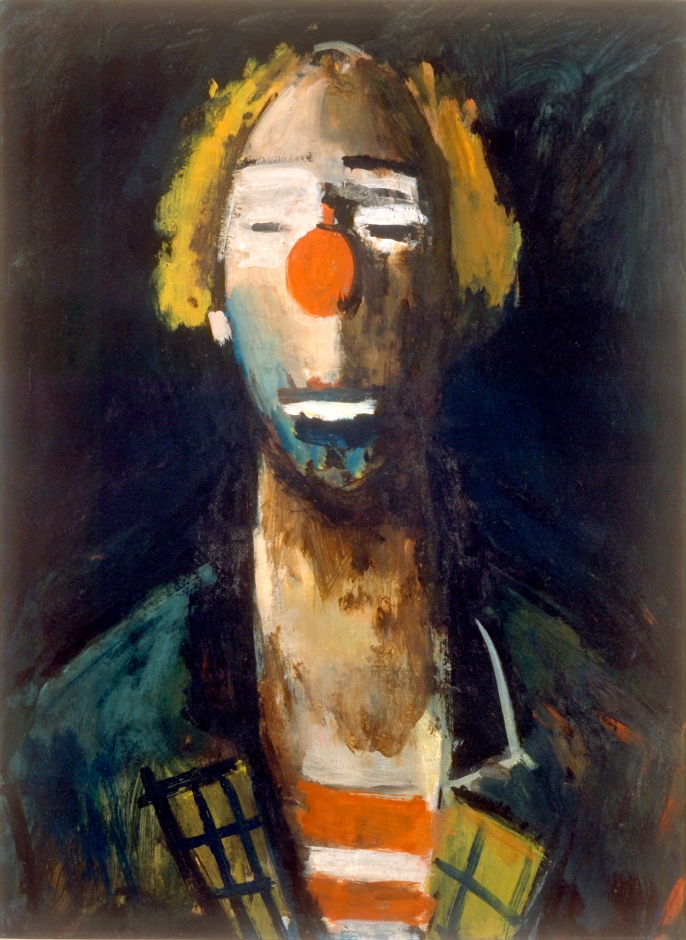 Joseph Kutter: Tête de Clown. MNHA, Luxembourg